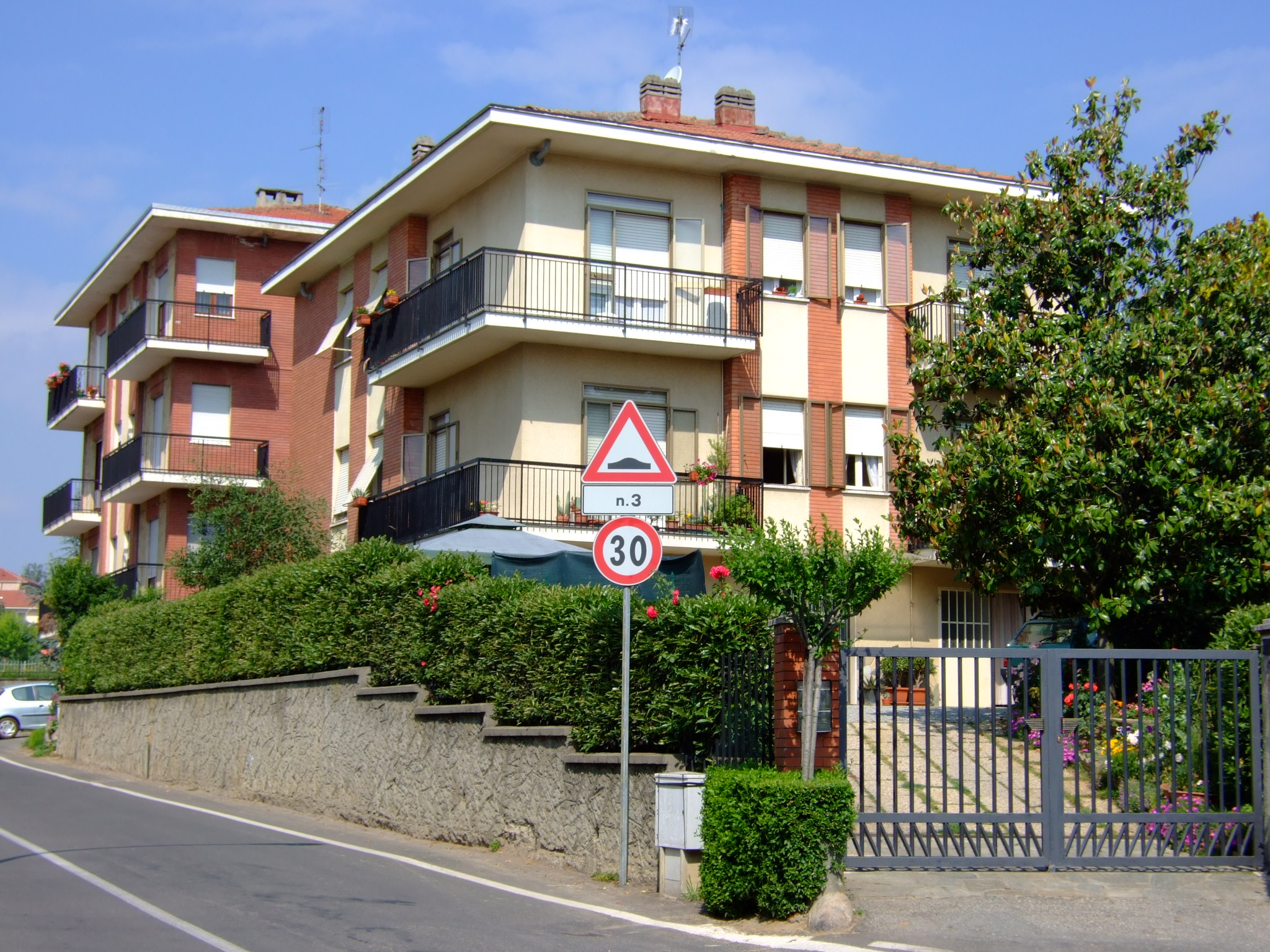 Immeubles d'habitation dans le quartier ouest de Chieri